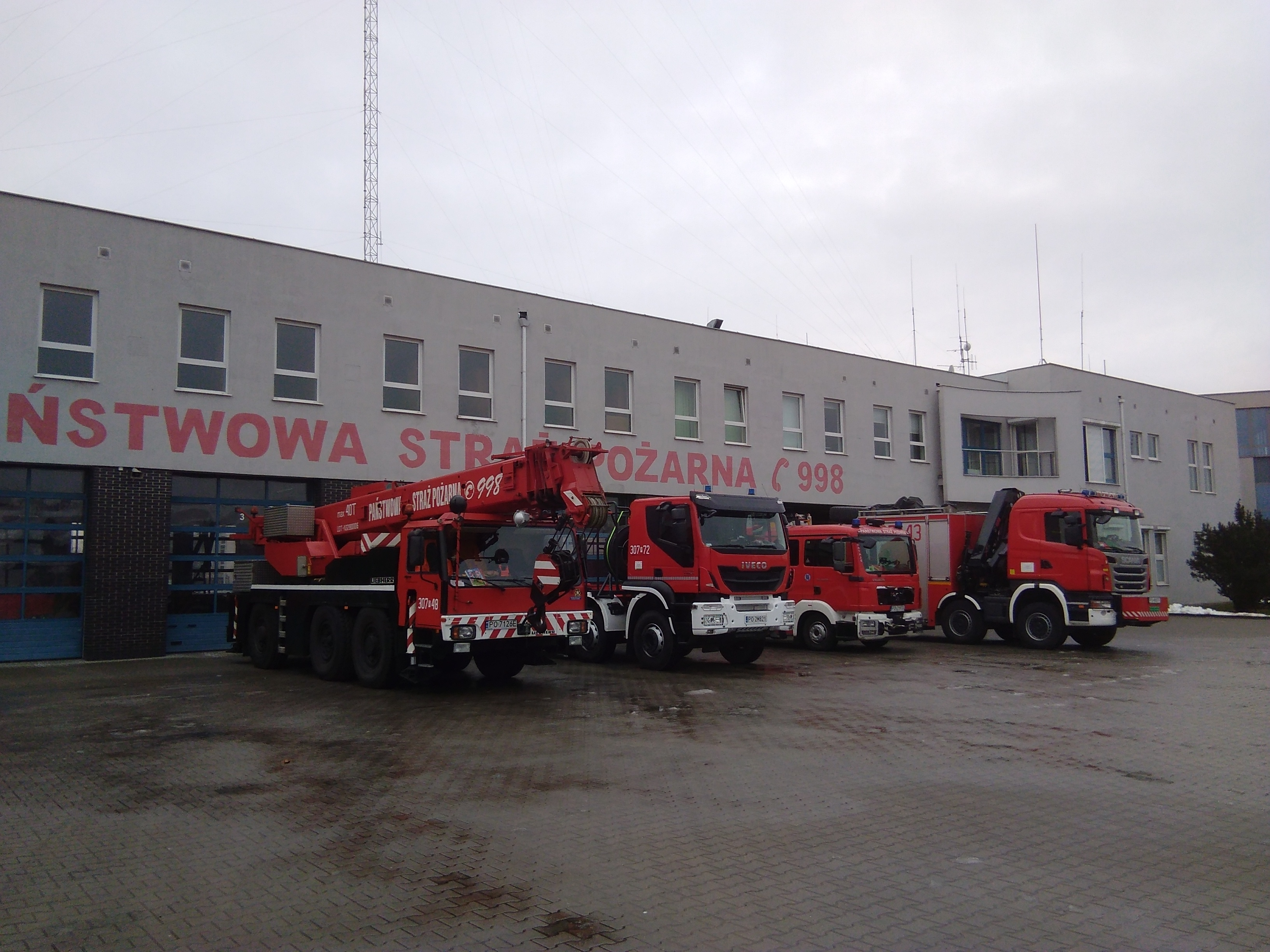 Straż Pożarna w Poznaniu na ulicy Bobrzańskiej.